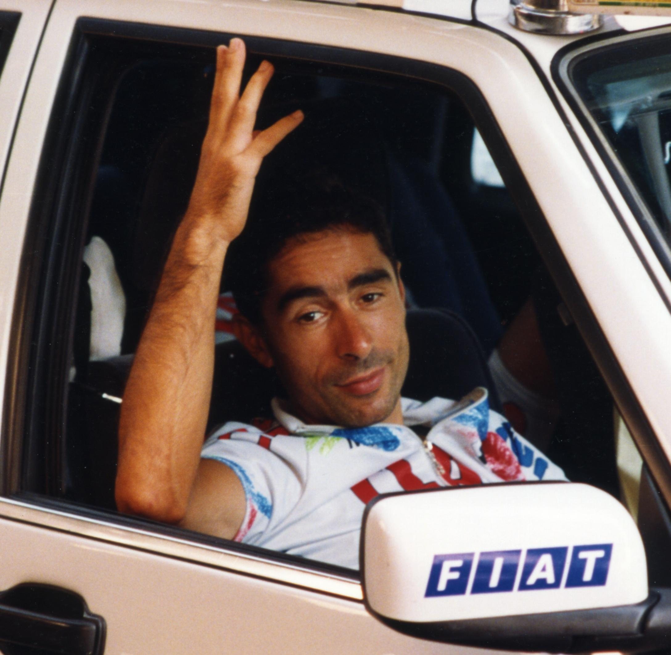 TOUR DE FRANCE 1993